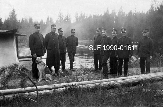 Politifolk ved Julussa, ved konflikten i mai 1927